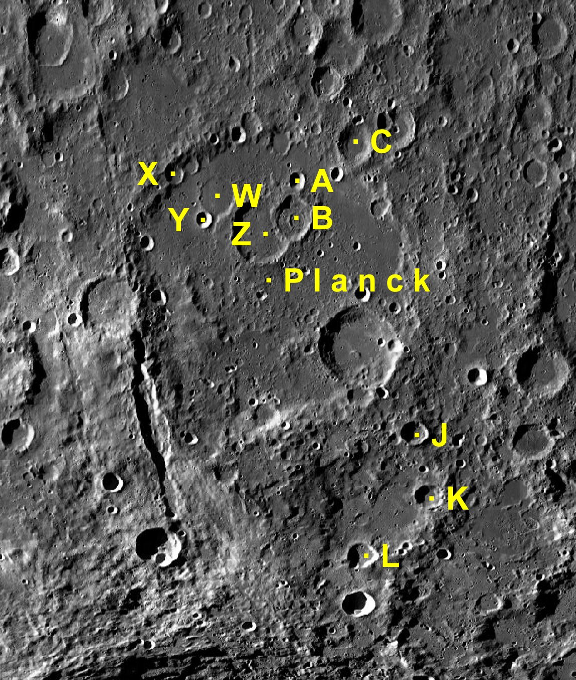 Cráter lunar Planck. Cráteres satélite. (Imagen LRO)